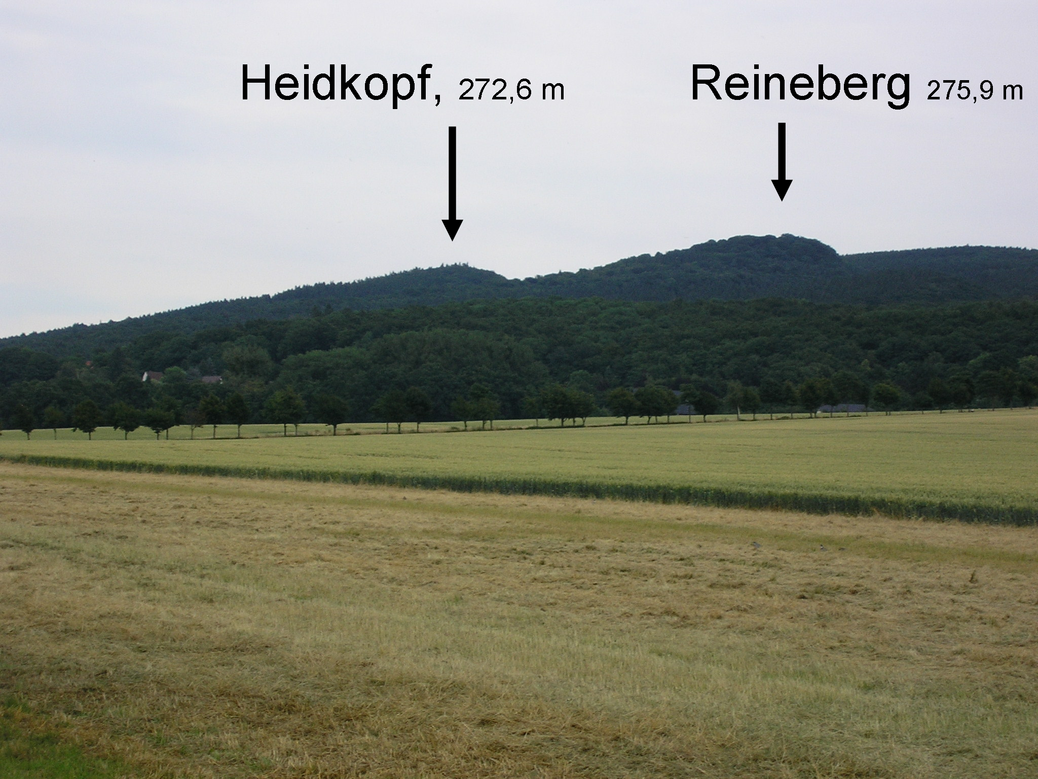 Heidkopf und Reineberg